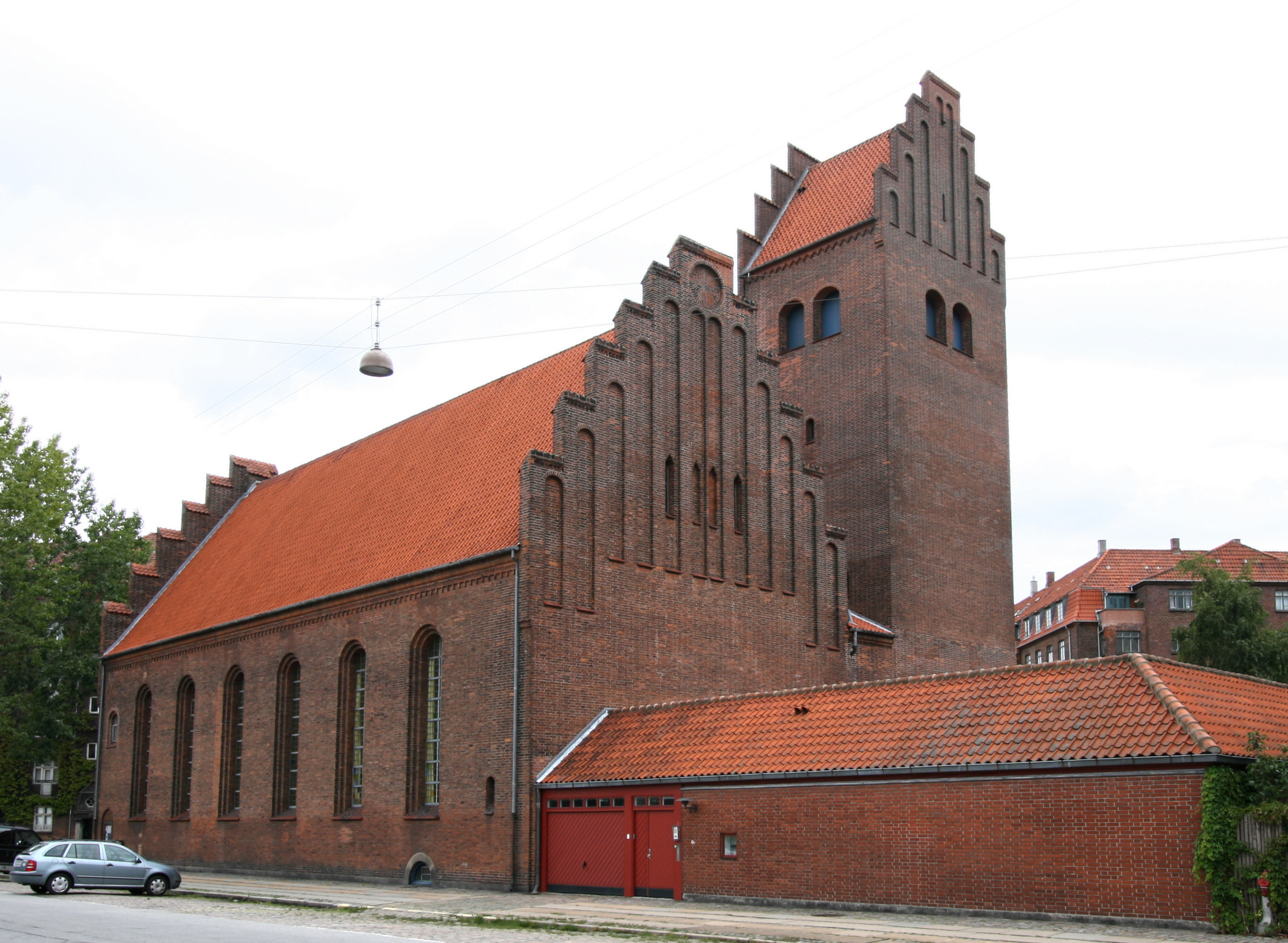 Hans Tausens Kirke, Amager, Copenhagen, Denmark. Hans_Tausens_Kirke